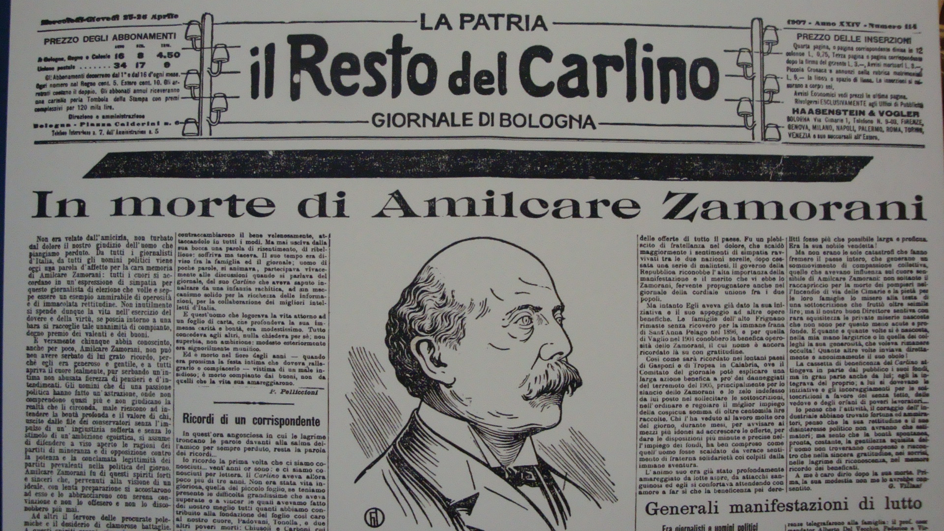 Prima pagina de il Resto del Carlino del 25-26 aprile 1907 (Anno XXIV).